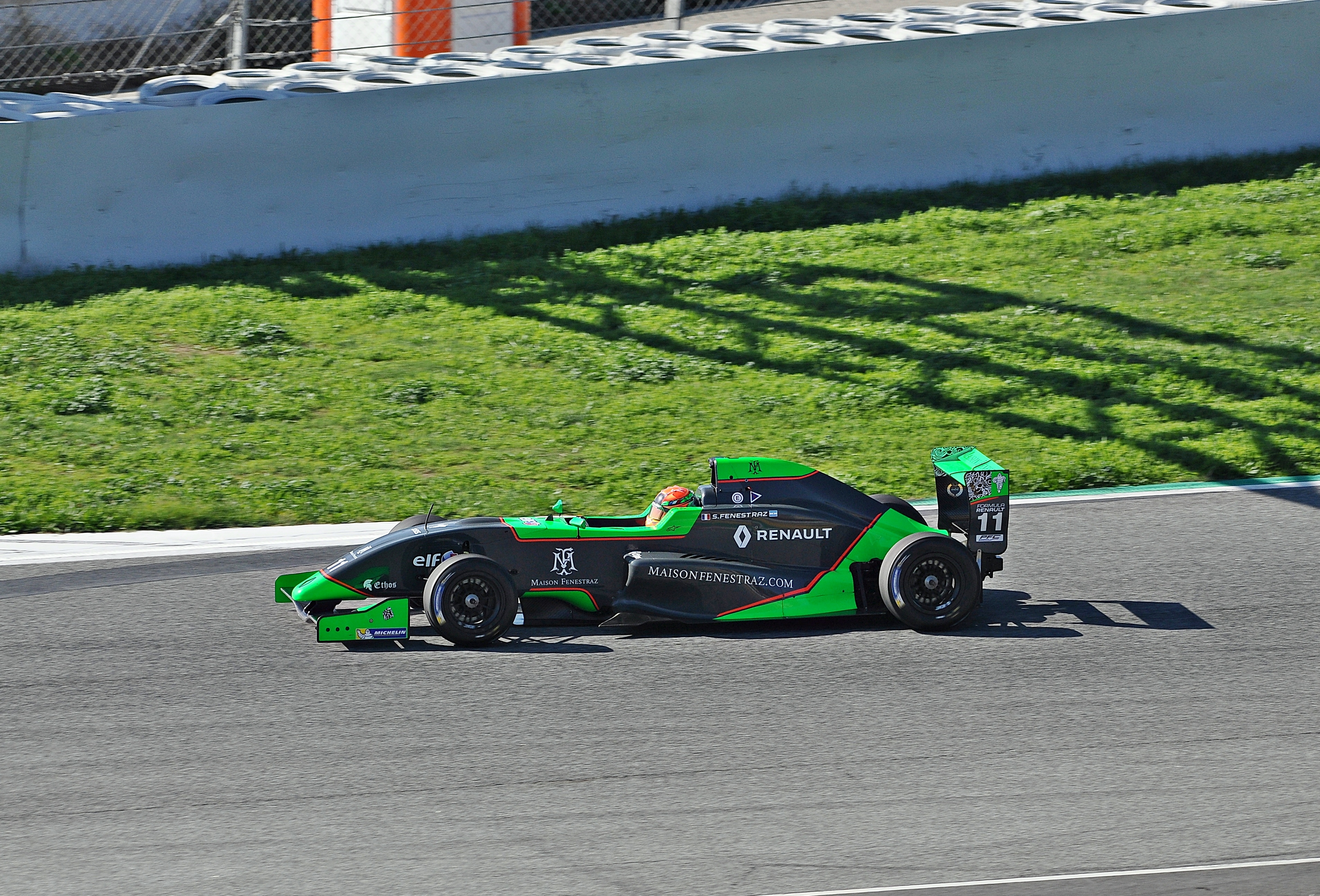 Circuito de Barcelona 2017